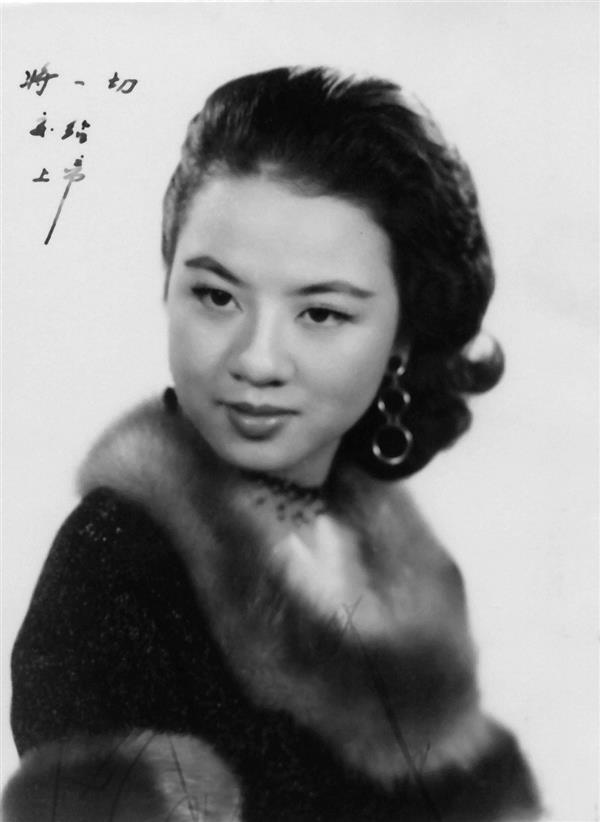 鍾情之肖像照。